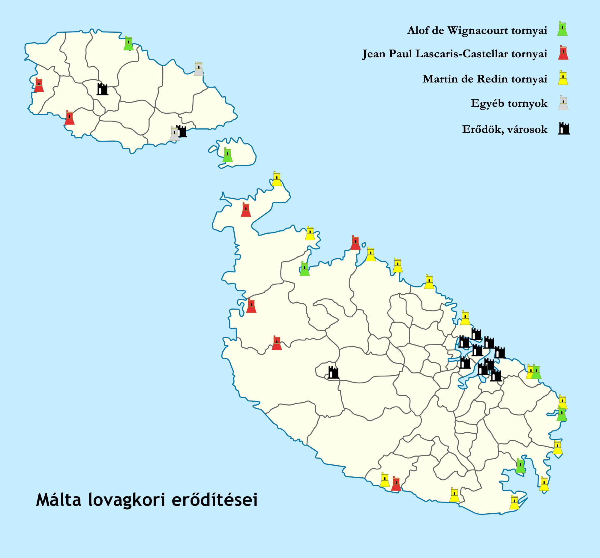 Málta lovagkori erődítéseinek elhelyezkedése